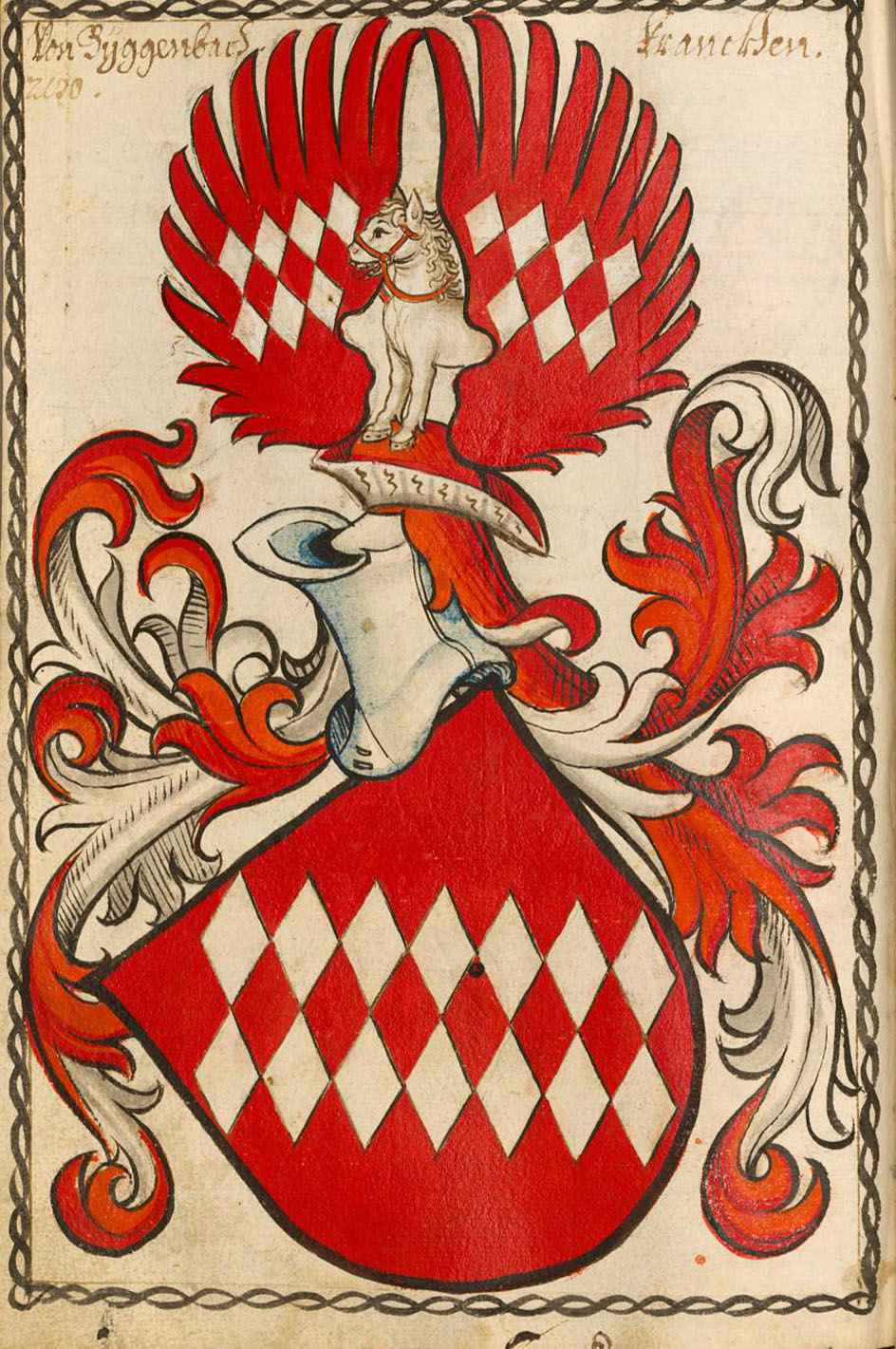 Scheibler'sches Wappenbuch , älterer Teil; Seite 280 Von Byggenbach Franken